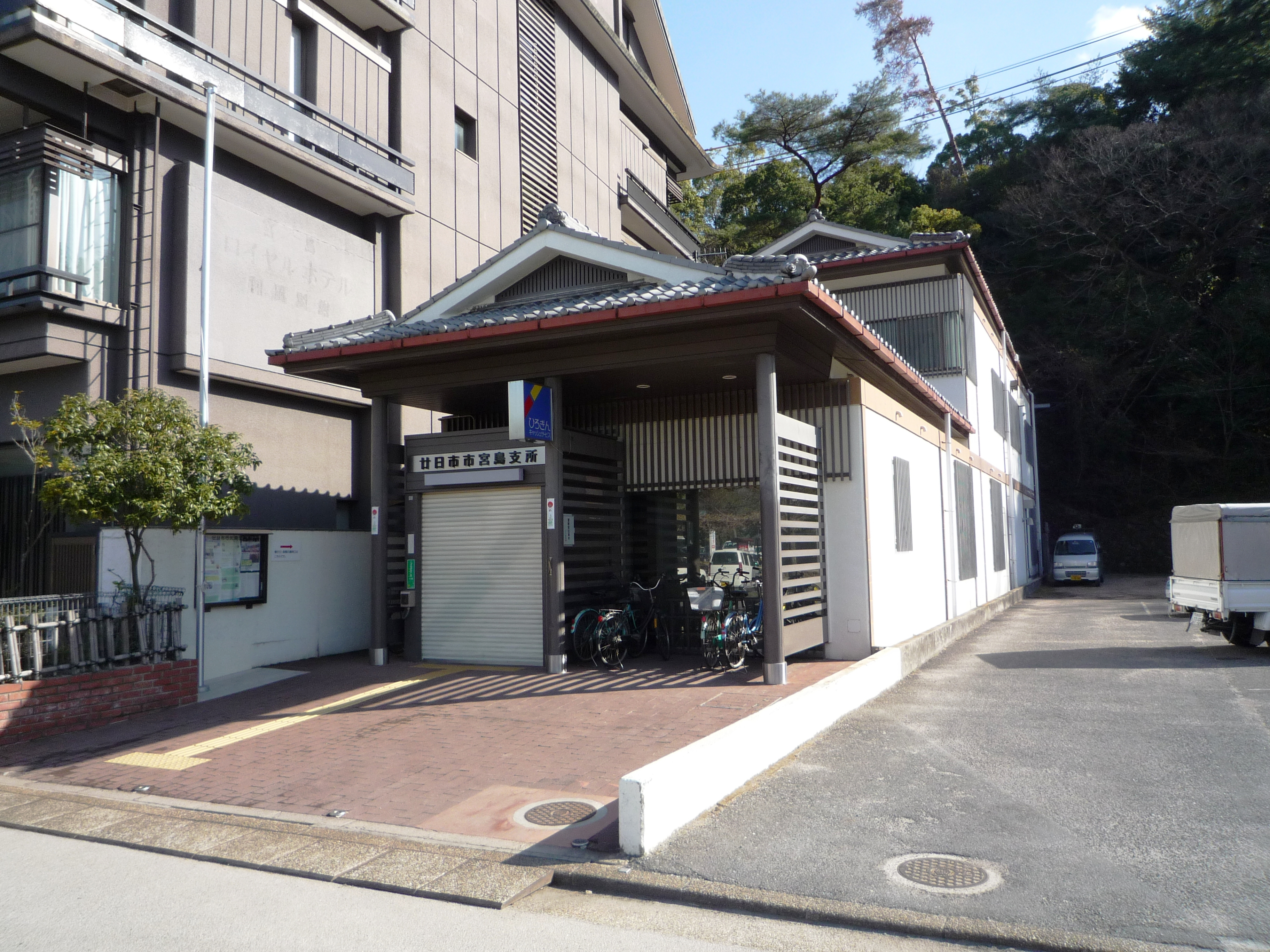 廿日市市役所宮島支庁